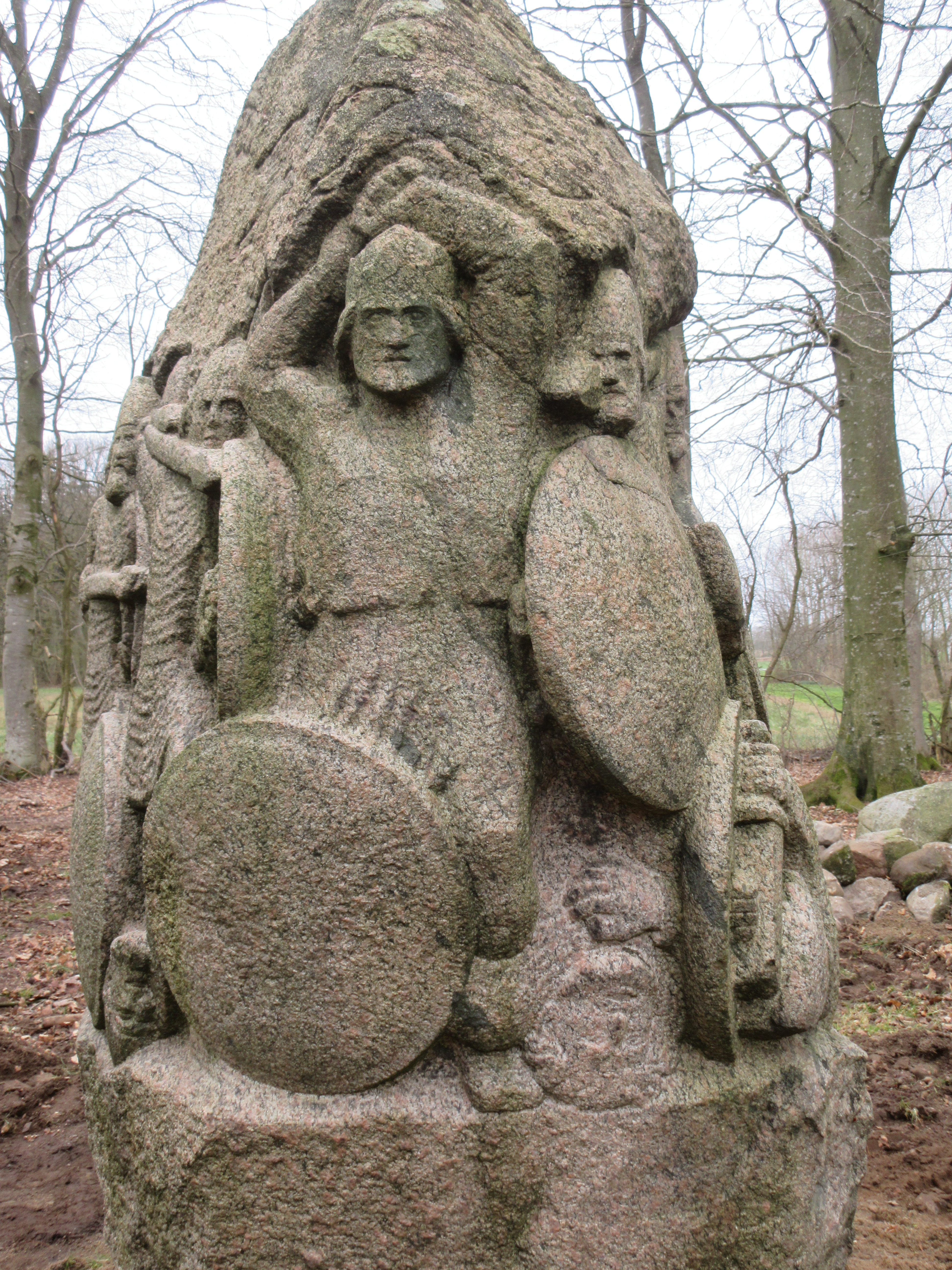 Magnusstenen i Skibelund Krat udført af den danske billedhugger og maler Niels Skovgaard til minde om Magnus den Godes sejr i slaget på Lyrskov Hede i 1043